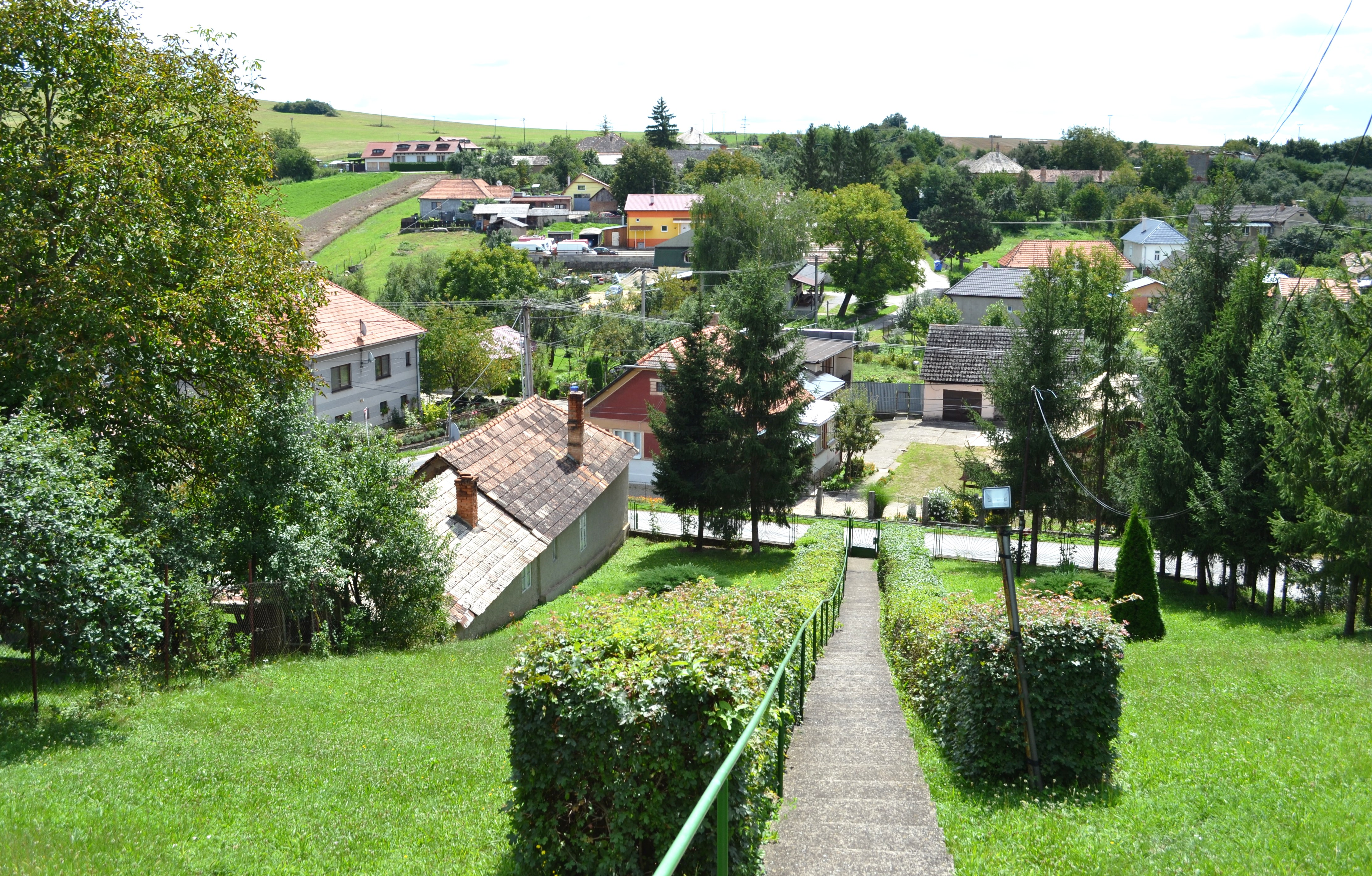 Lenka, pohľad na obec od miestneho kostola